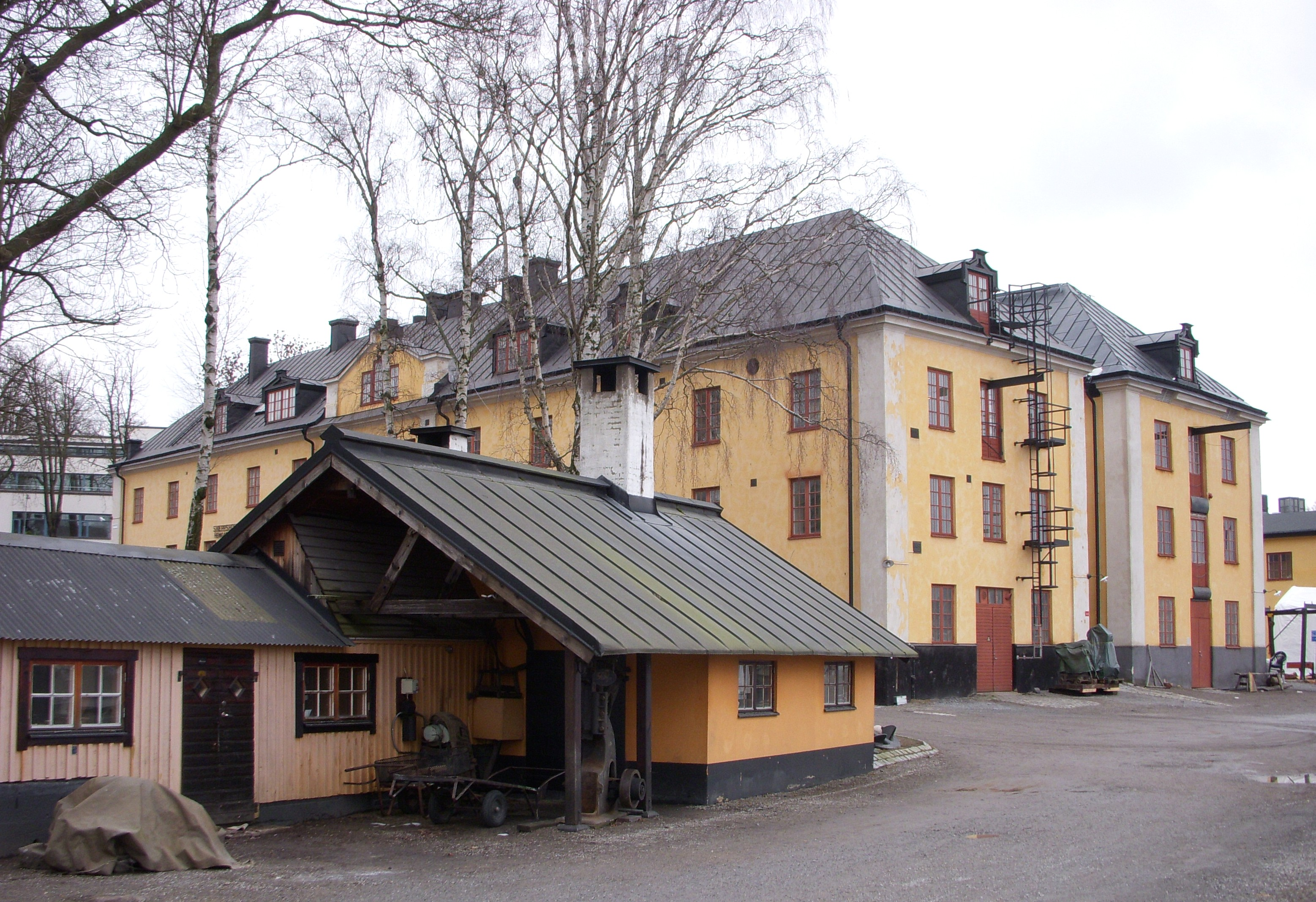 "Södra och Norra Fundamentet" på Skeppsholmen i Stockholm, plats för Skeppsholmens folkhögskola.